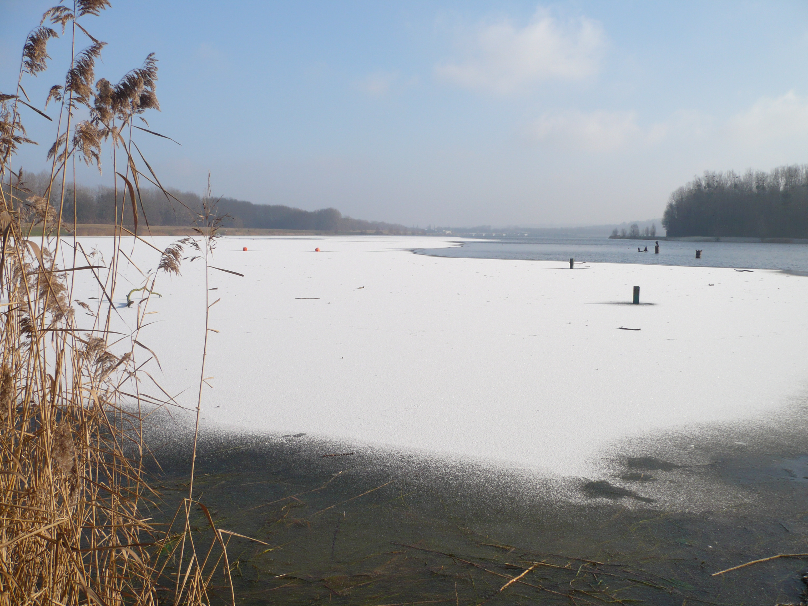 Le lac de la base nautique de Vaires sur Marne, sous la neige, vu depuis Chelles.